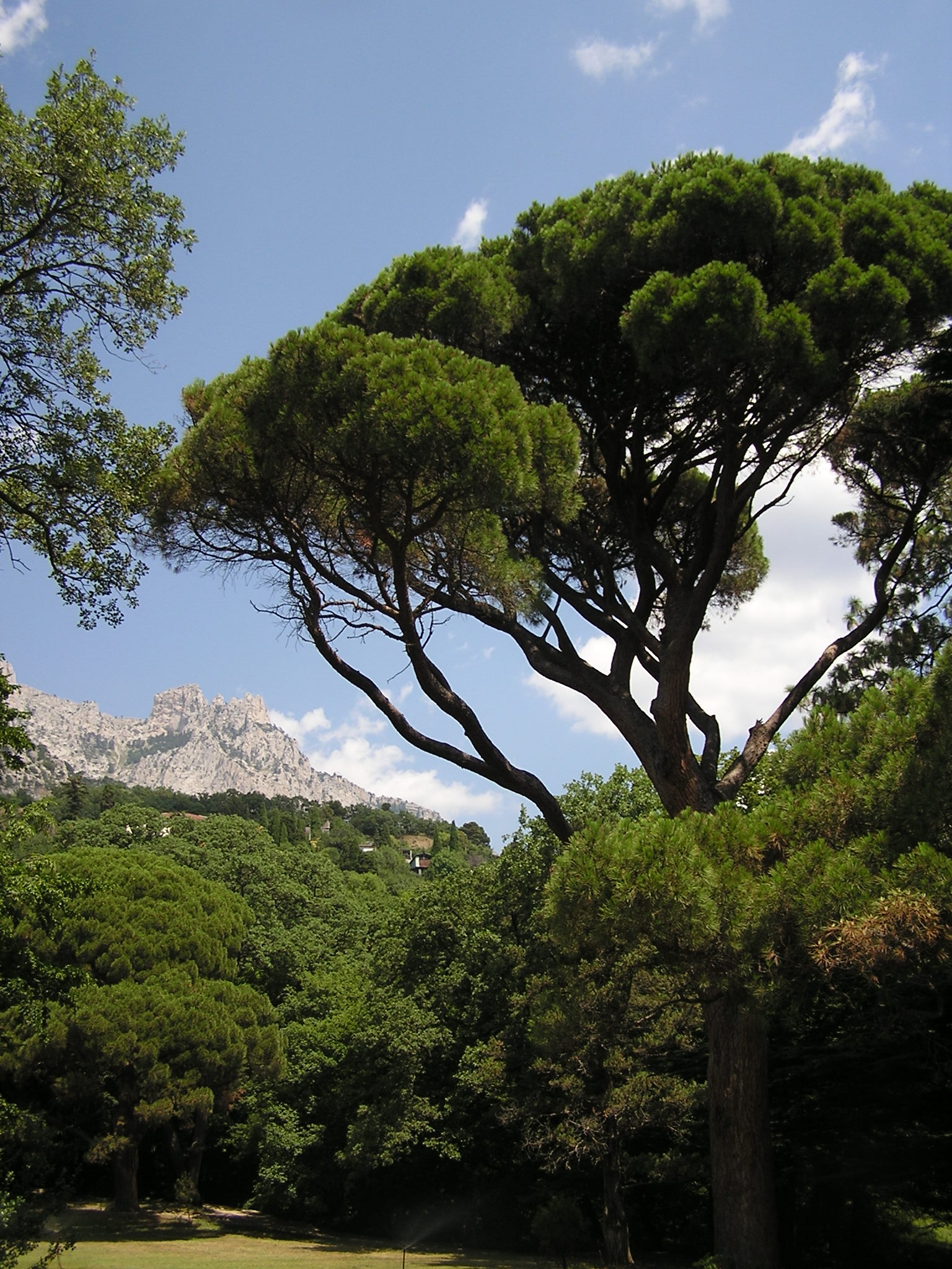 Алупка. Ворнцовский парк